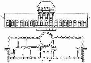 Фасад і план палаца ў Шчорсах